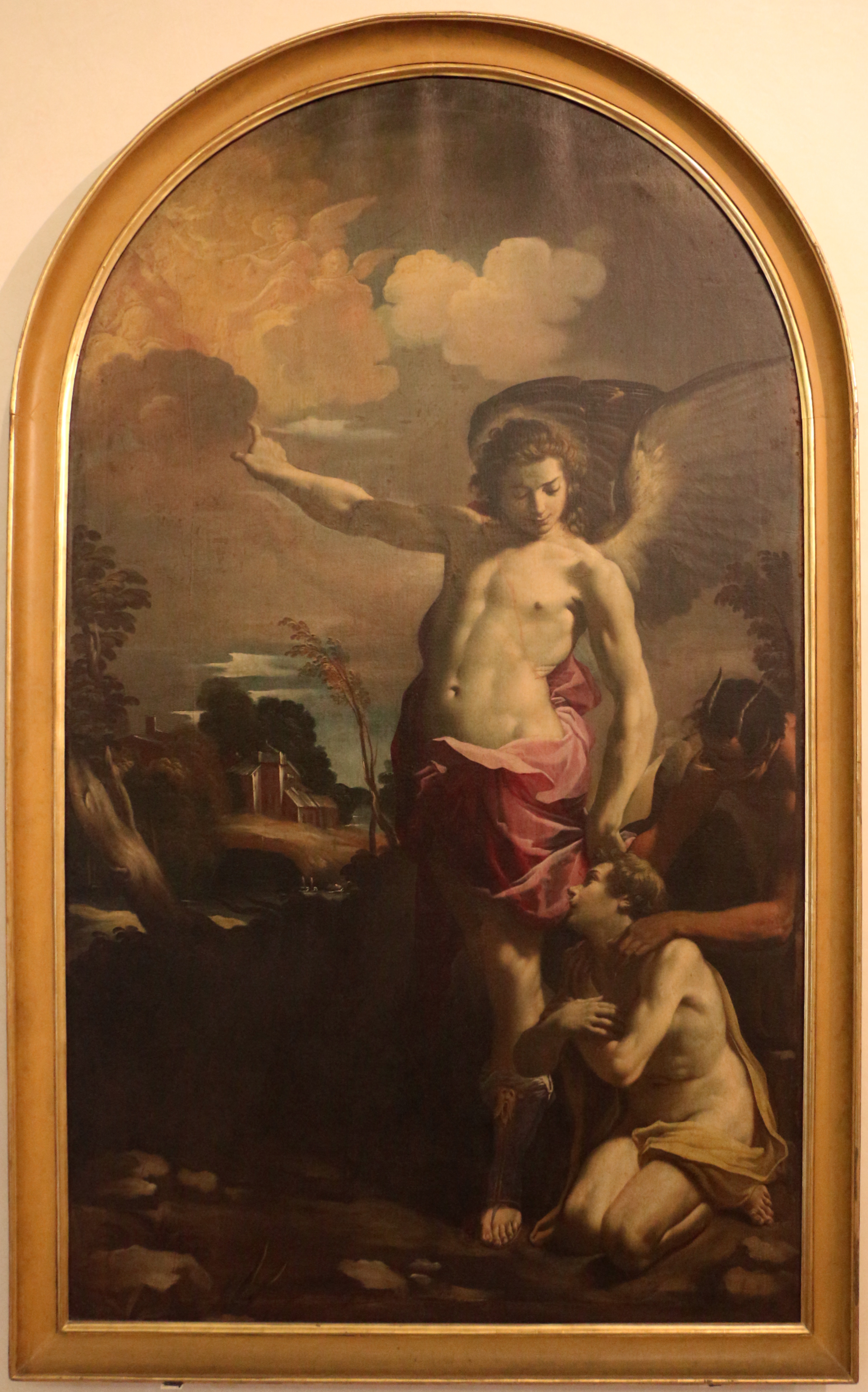 Palazzo dei Diamanti (Ferrara) This is a photo of a monument which is part of cultural heritage of Italy.